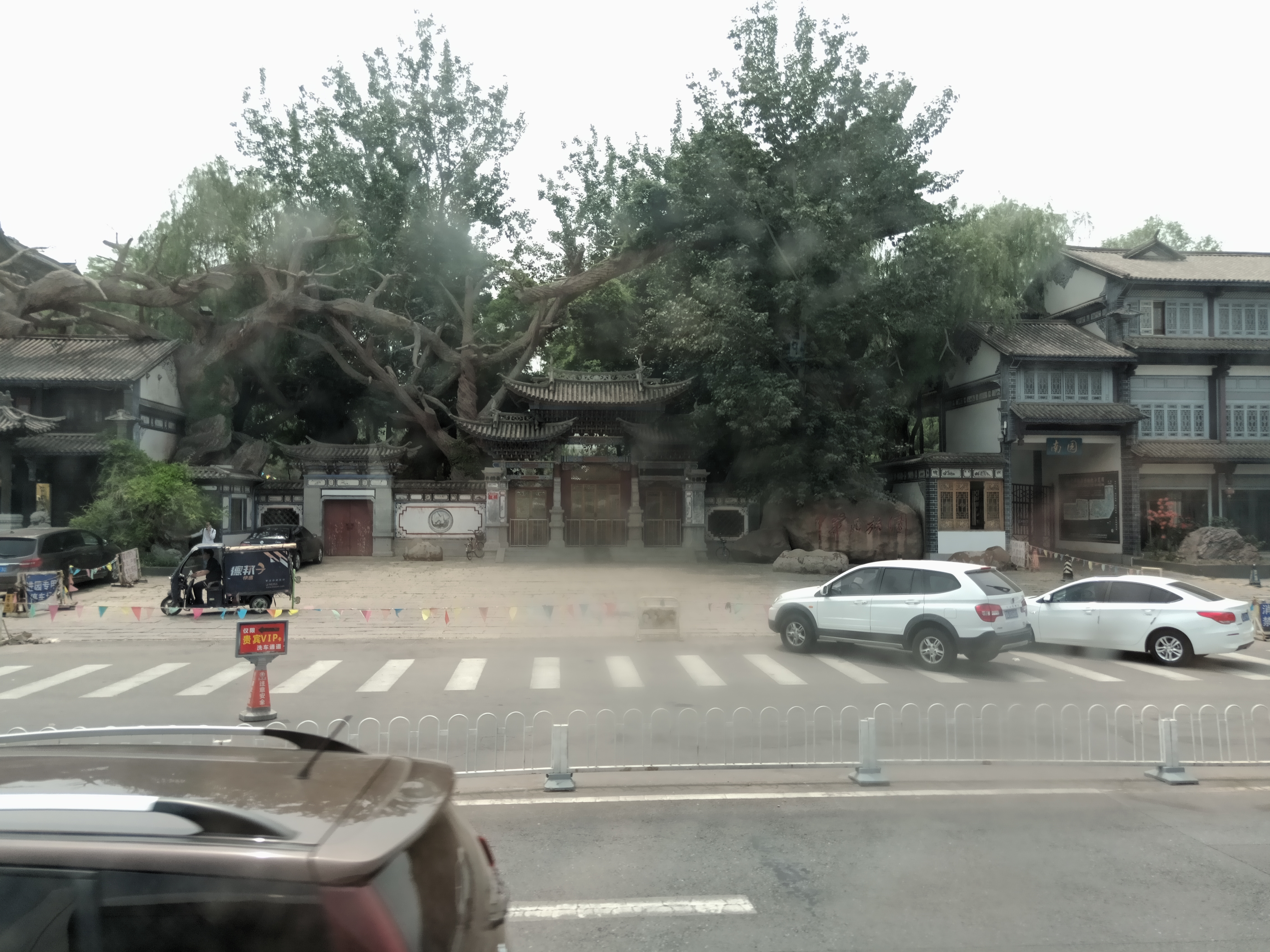 粵語: 中華民族博物院（南園）